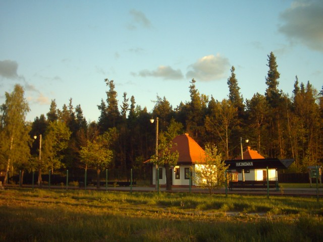 Baza kolejki wąskotorowej w Hajnówce